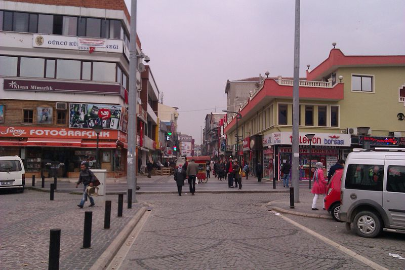 Düzce il merkezinin spor sokağına doğru görünüşü